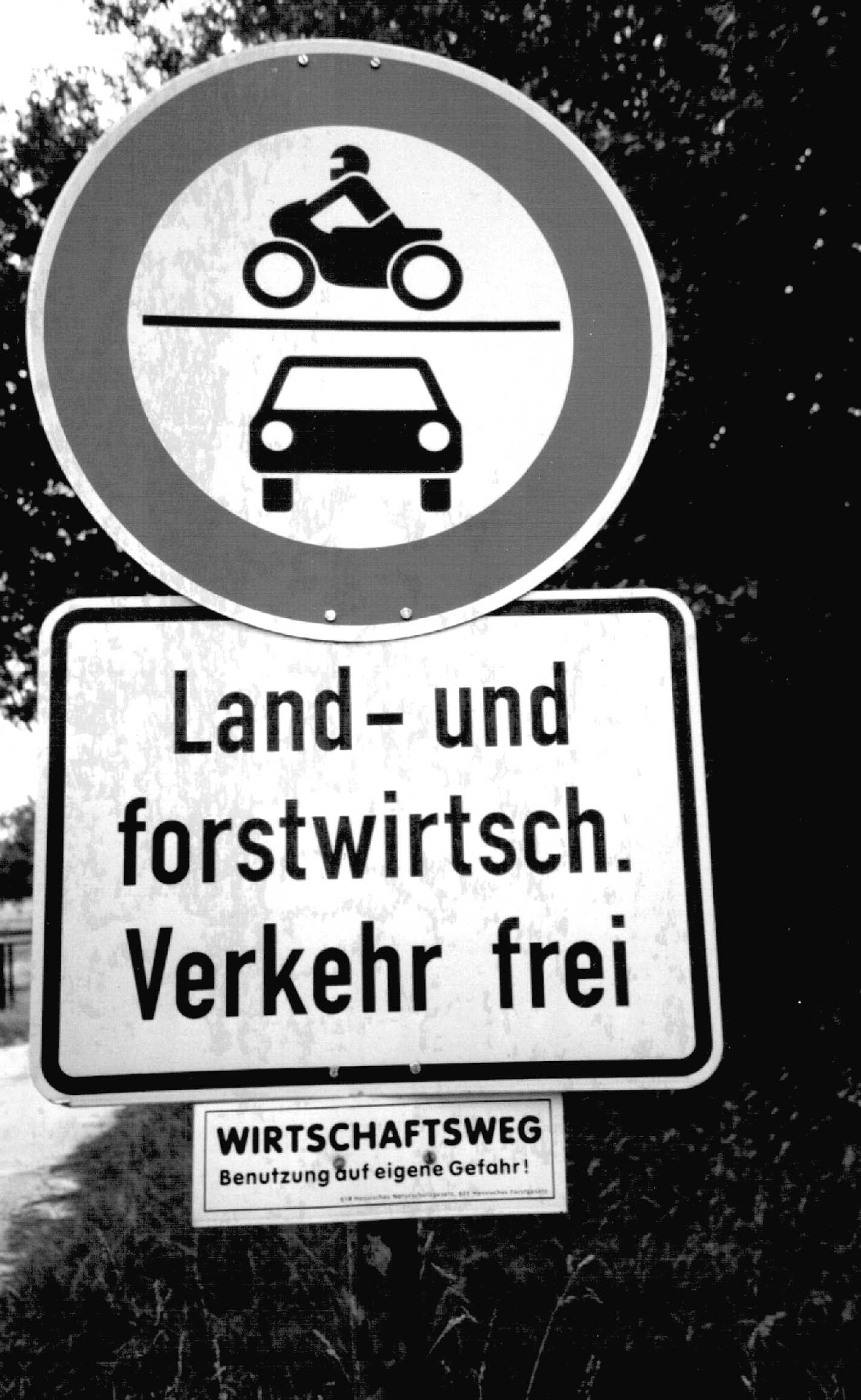 haftungsrechtskompatible Beschilderung Wirtschaftsweg